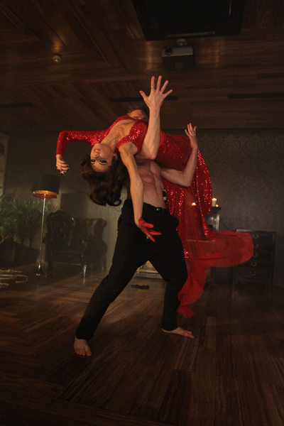 Анна Плетнёва на съёмках клипа Роман